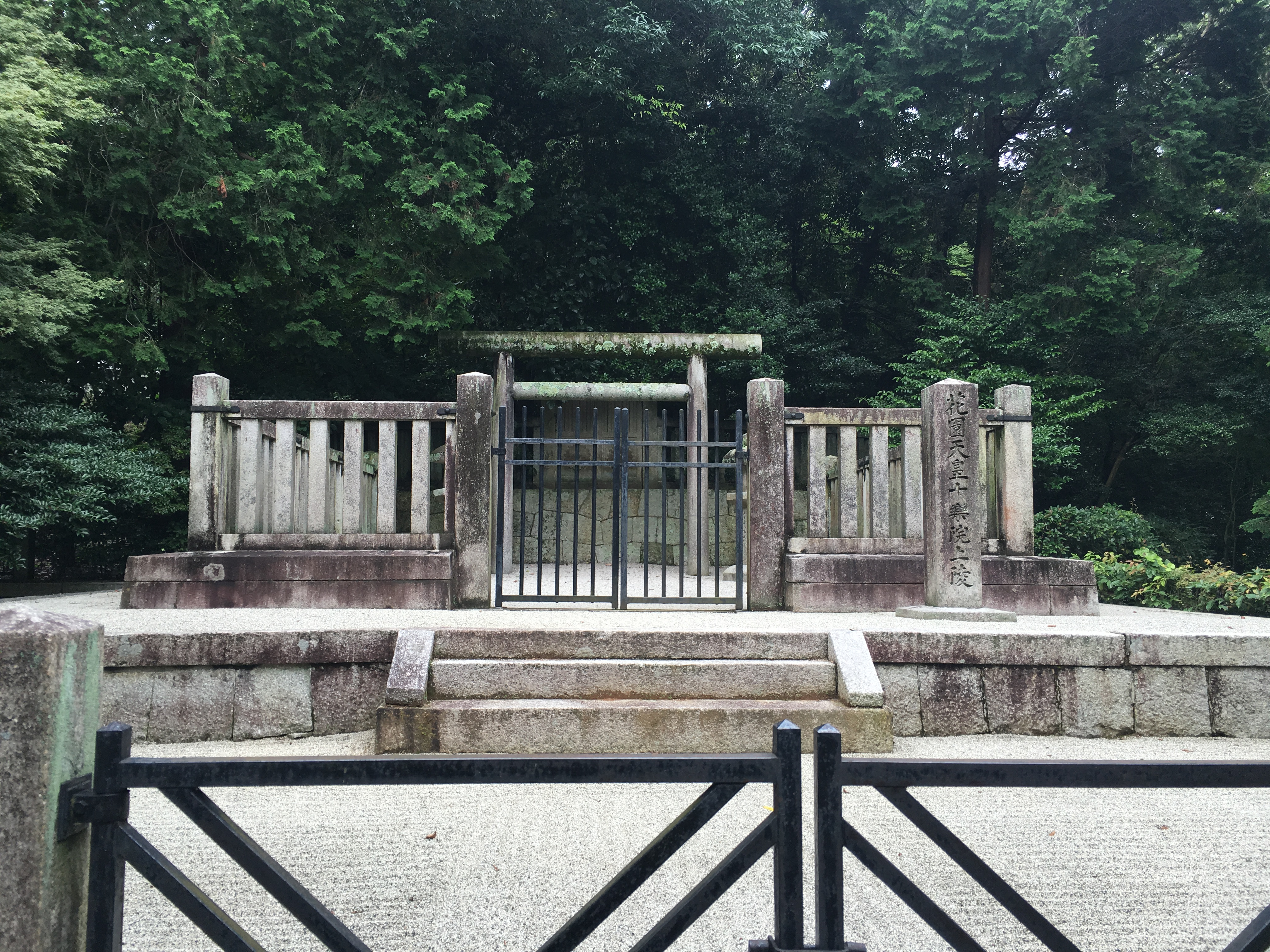 花園天皇陵